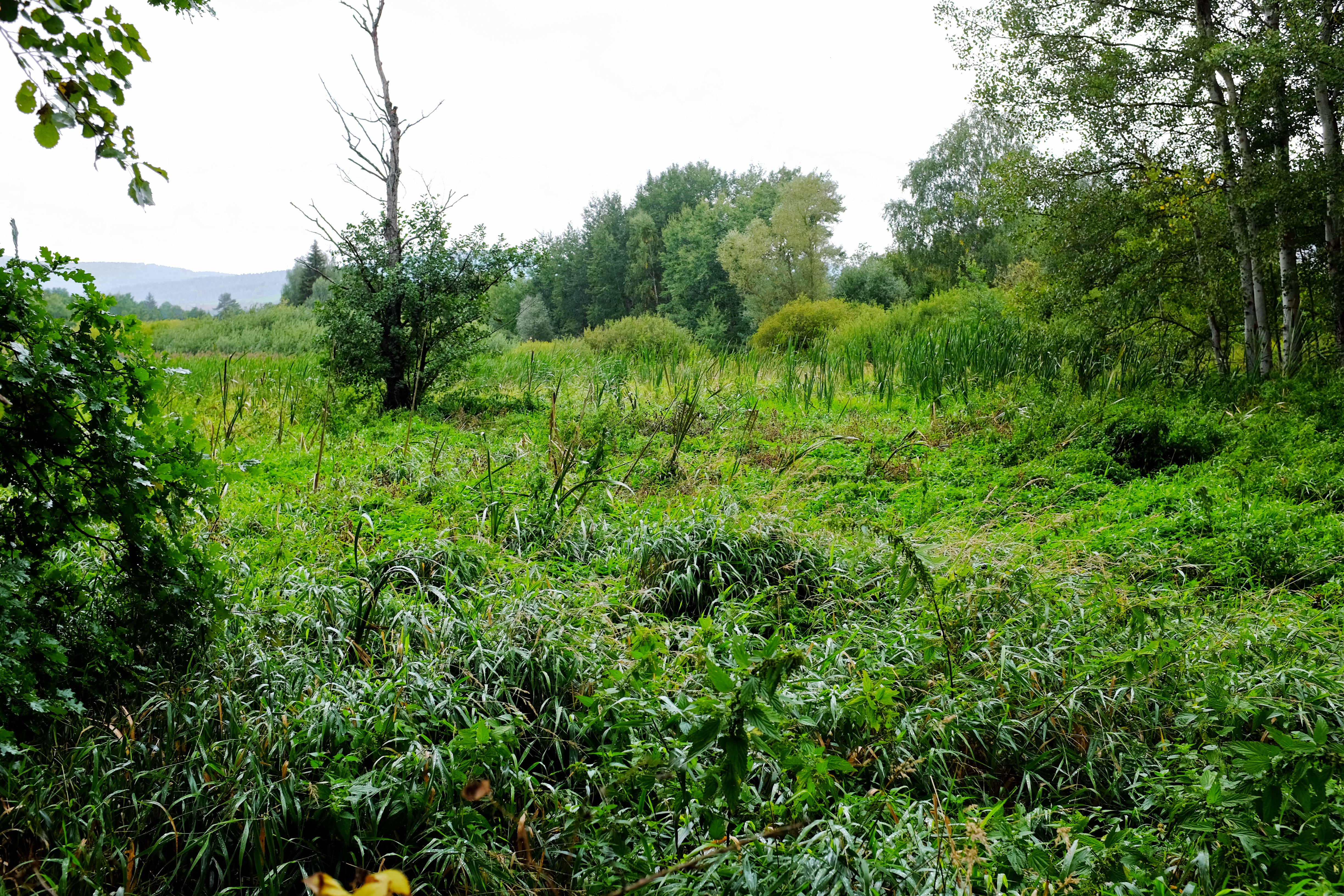 Přírodní památka Louka u Šnajberského rybníka, okres Domažlice